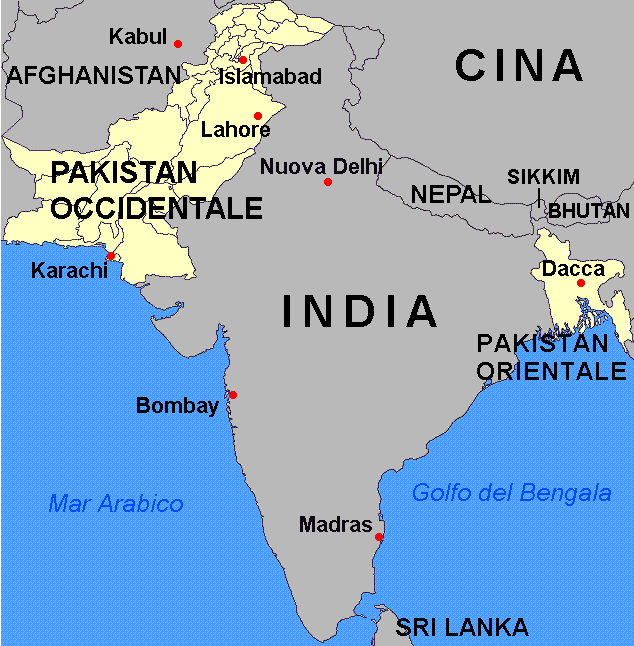 Mappa del Pakistan e le sue suddivisioni amministrative prima del 1970.